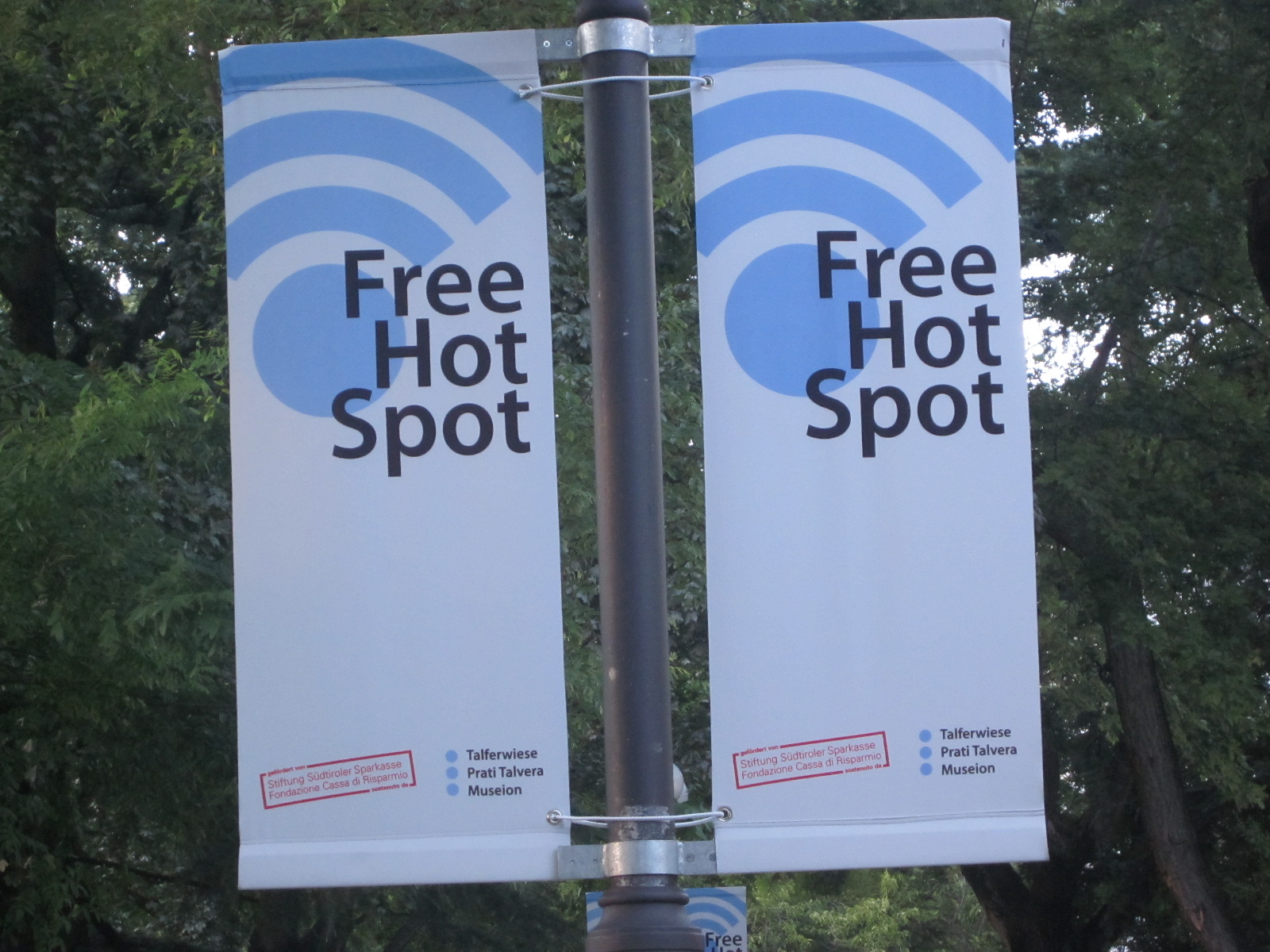 manifesto che indica il hotspot messo a disposizione dalla fondazione cassa di risparmio di Bolzano